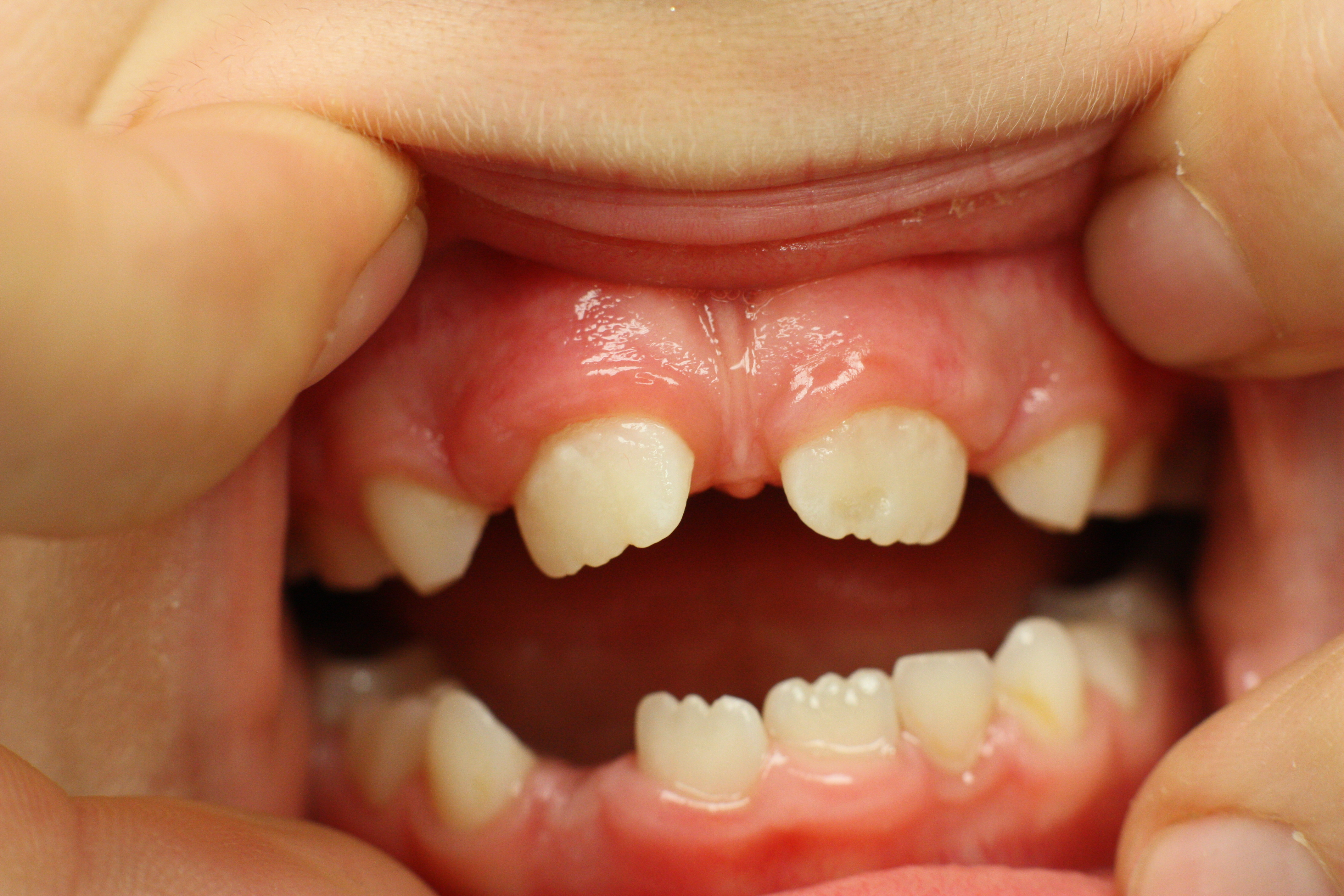 ZahnTrema zwischen den bleibenden mittleren Schneidezähnen Oberkiefer, Wechselgebiss